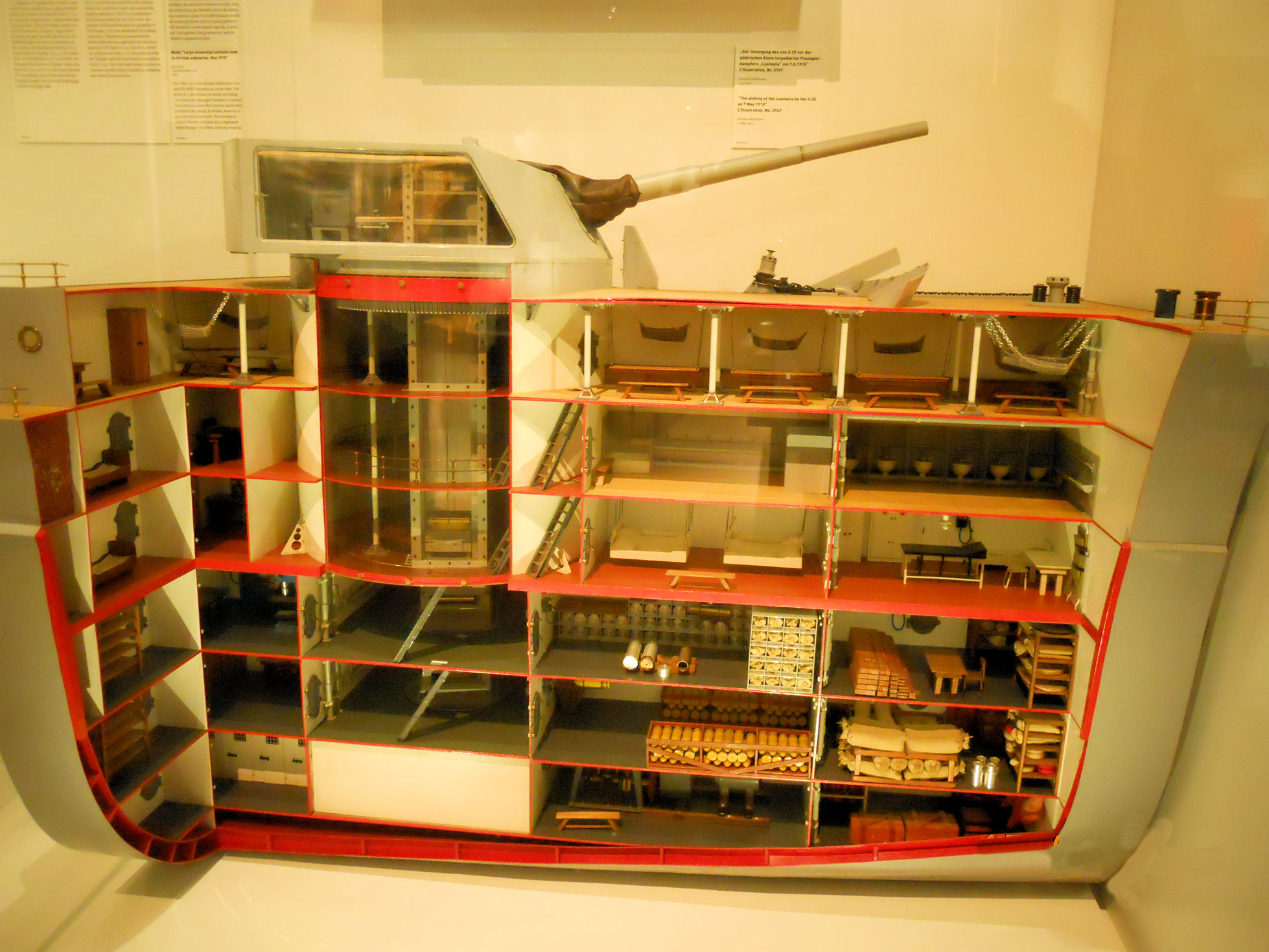 Modell einer Sektion mit Geschützturm eines dt. Großkampfschiffes